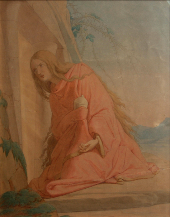 Grieving Mary Magdalene